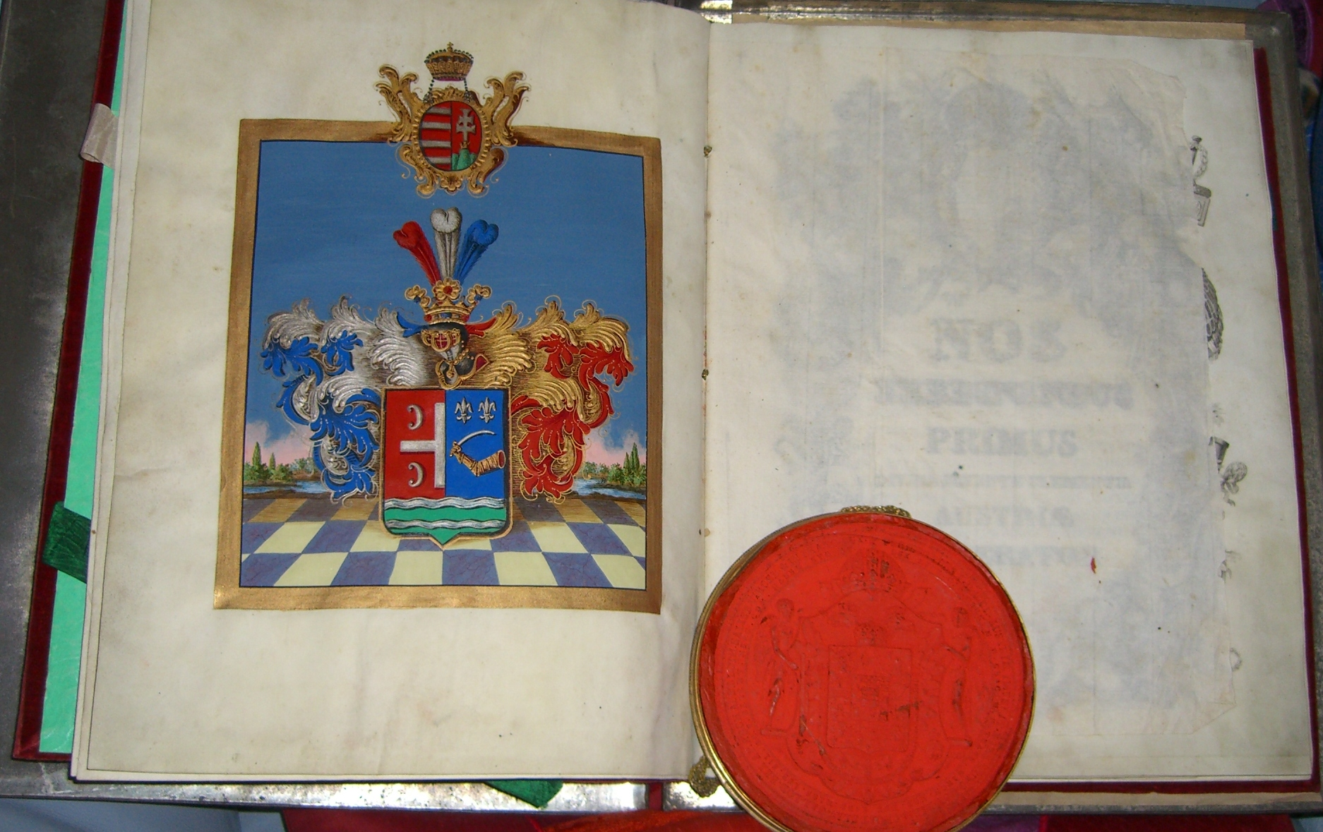 Textseite aus dem Adelsdiplom von 1835, welches durch Ferdinand I. (Kaiser von Österreich 1835-1848) in seiner Funktion als König von Ungarn für den k.k. Obersten Stephan [von] Millenkovich (1785-1863) ausgestellt wurde.